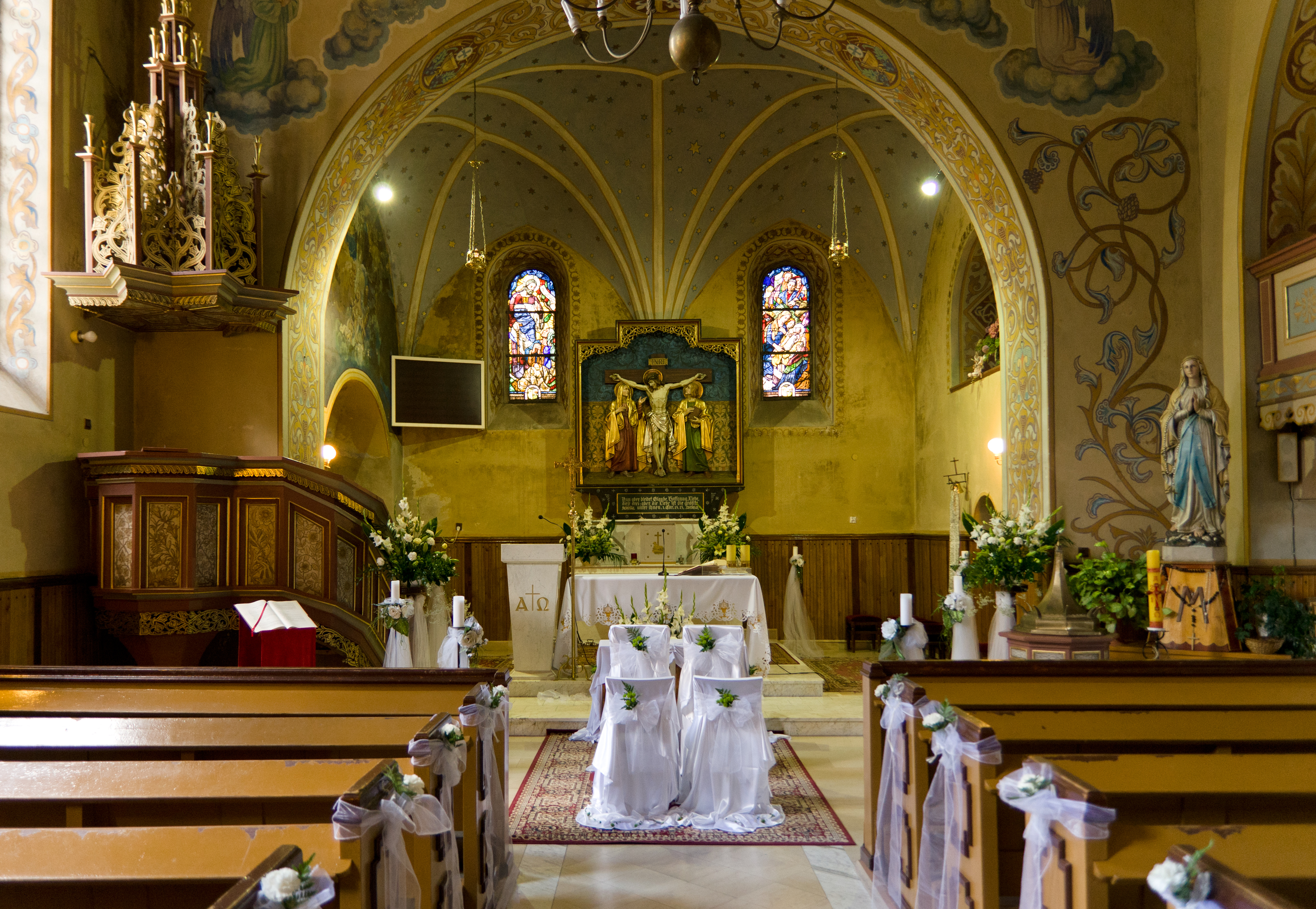 Wnętrze kościoła p.w. Wniebowzięcia NMP we wsi Kalinowo (powiat ełcki) przygotowane do ceremonii ślubnej.